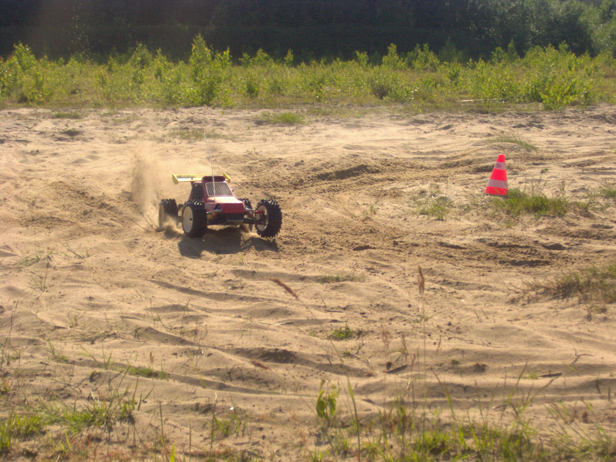 FG Marder auf der Rennstrecke